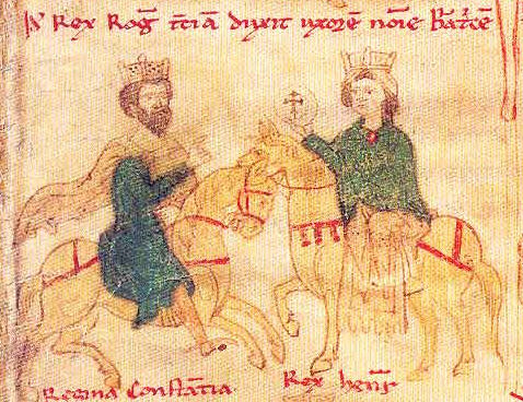 Roger II. Sicilský s Beatrix z Rethelu